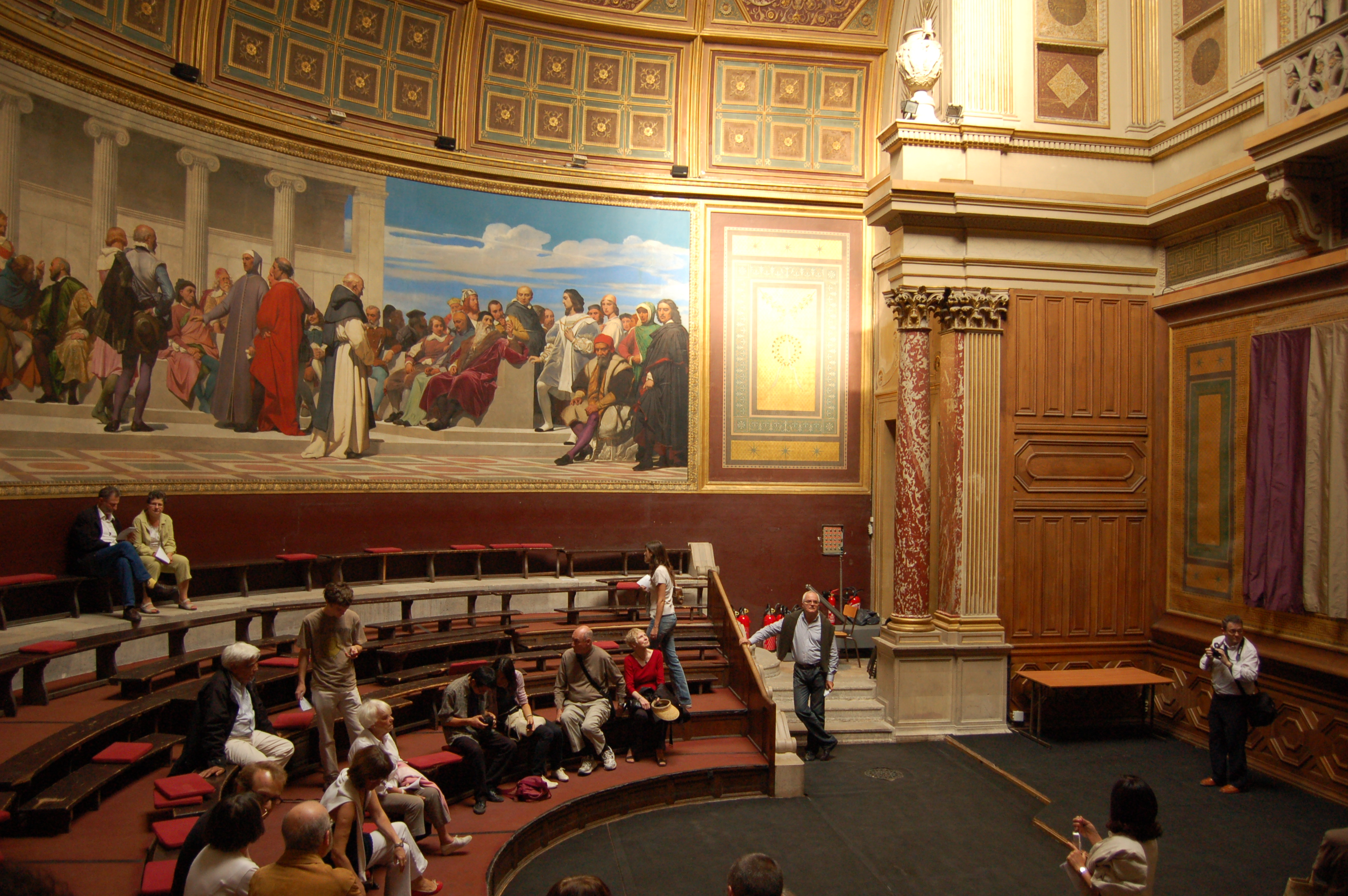 École Nationale Supérieure des Beaux-Arts, Amphithéâtre d'honneur